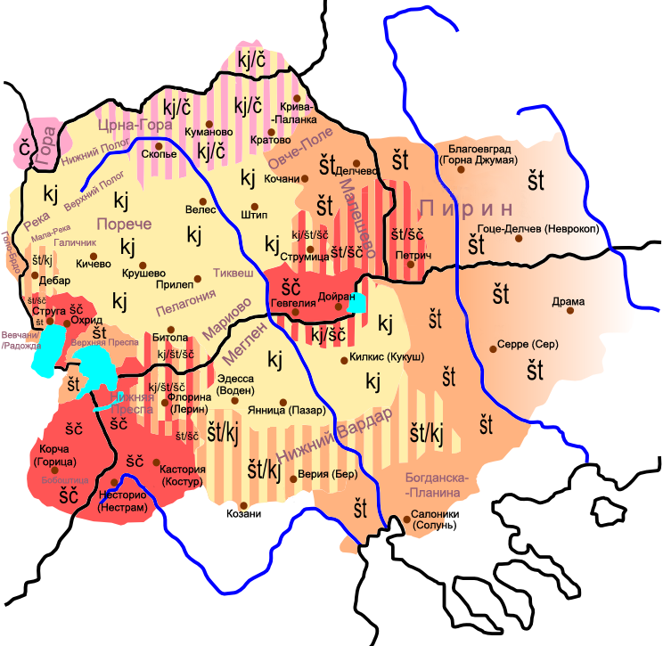 Область распространения континуанта праславянской *tj в македонском языковом ареале.